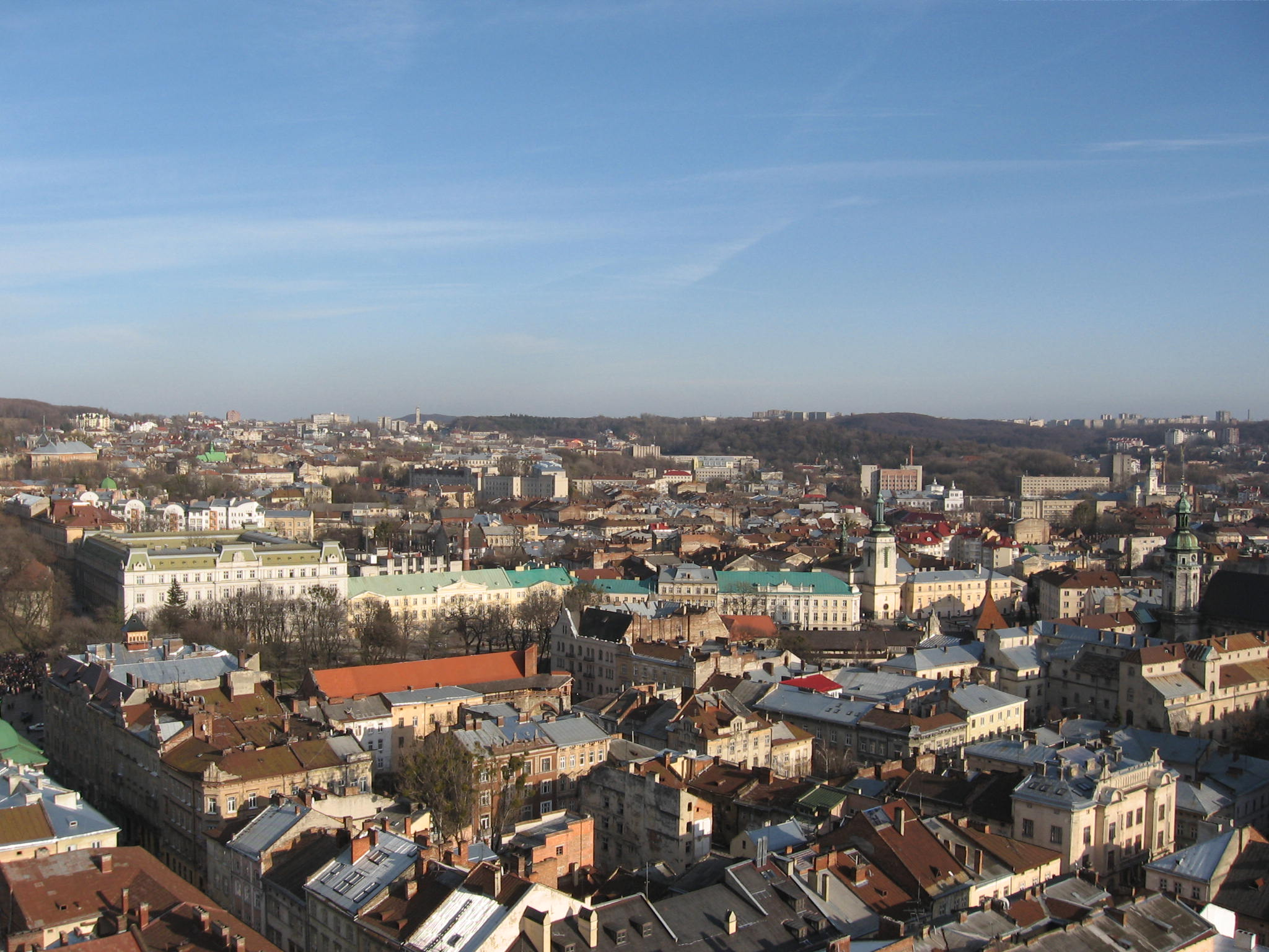 Краєвид з Лвівської ратуші (wiev from city hall)